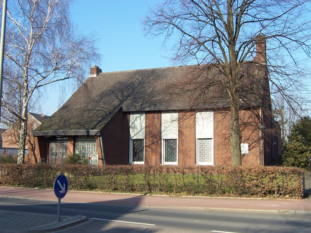 Ehemaliges Evangelisches Gemeindehaus in Asterlagen, an der Winkelhauser Strasse